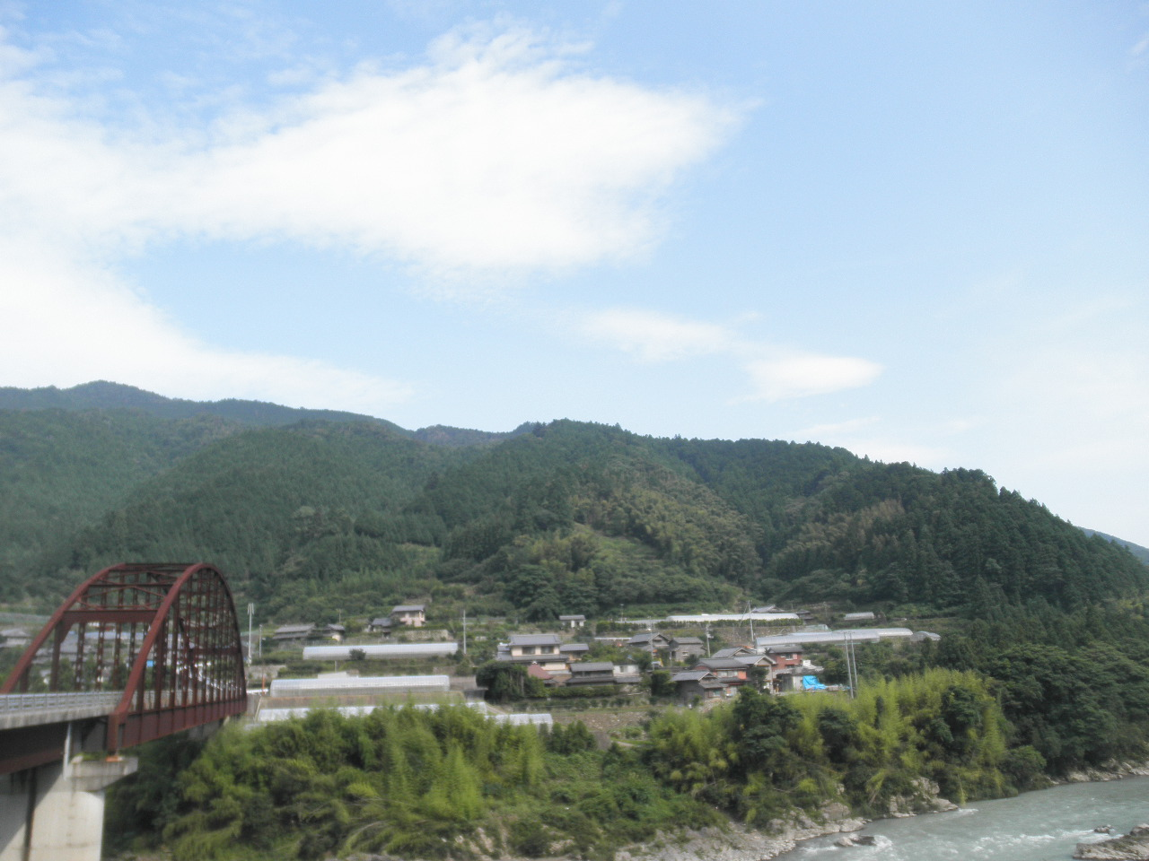 徳島県阿南市細野町谷上